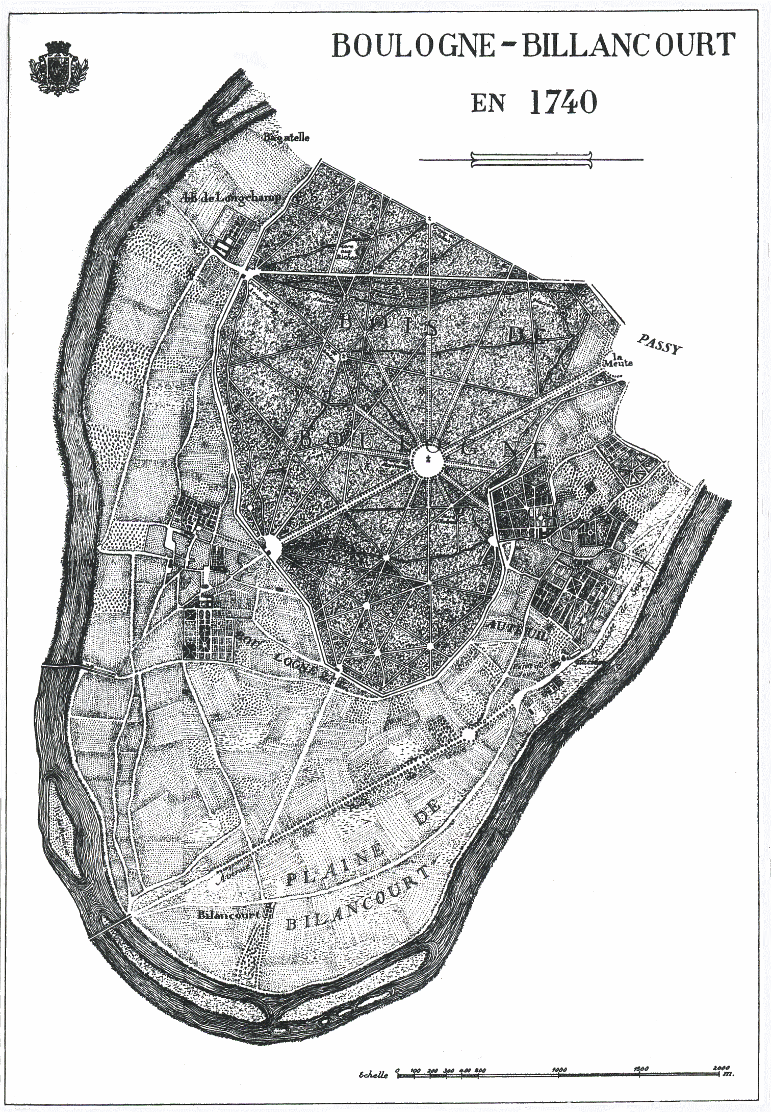 Plan ancien de Boulogne et de Billancourt.